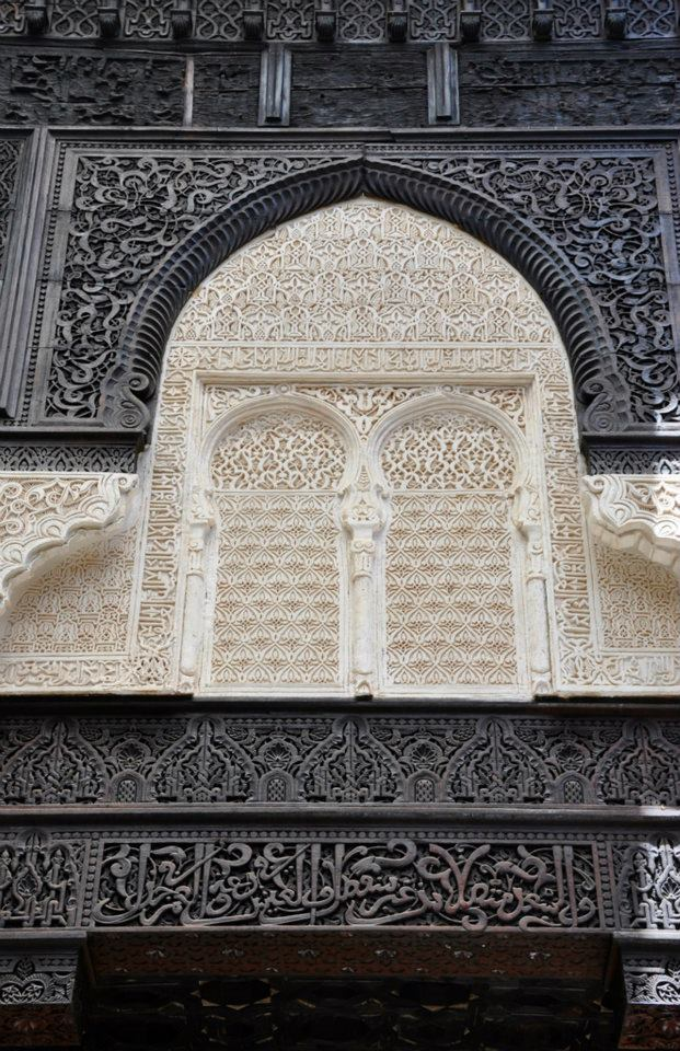 détails de stucs et bois sculpté hispano-mauresques à la Médersa mérinide de Salé